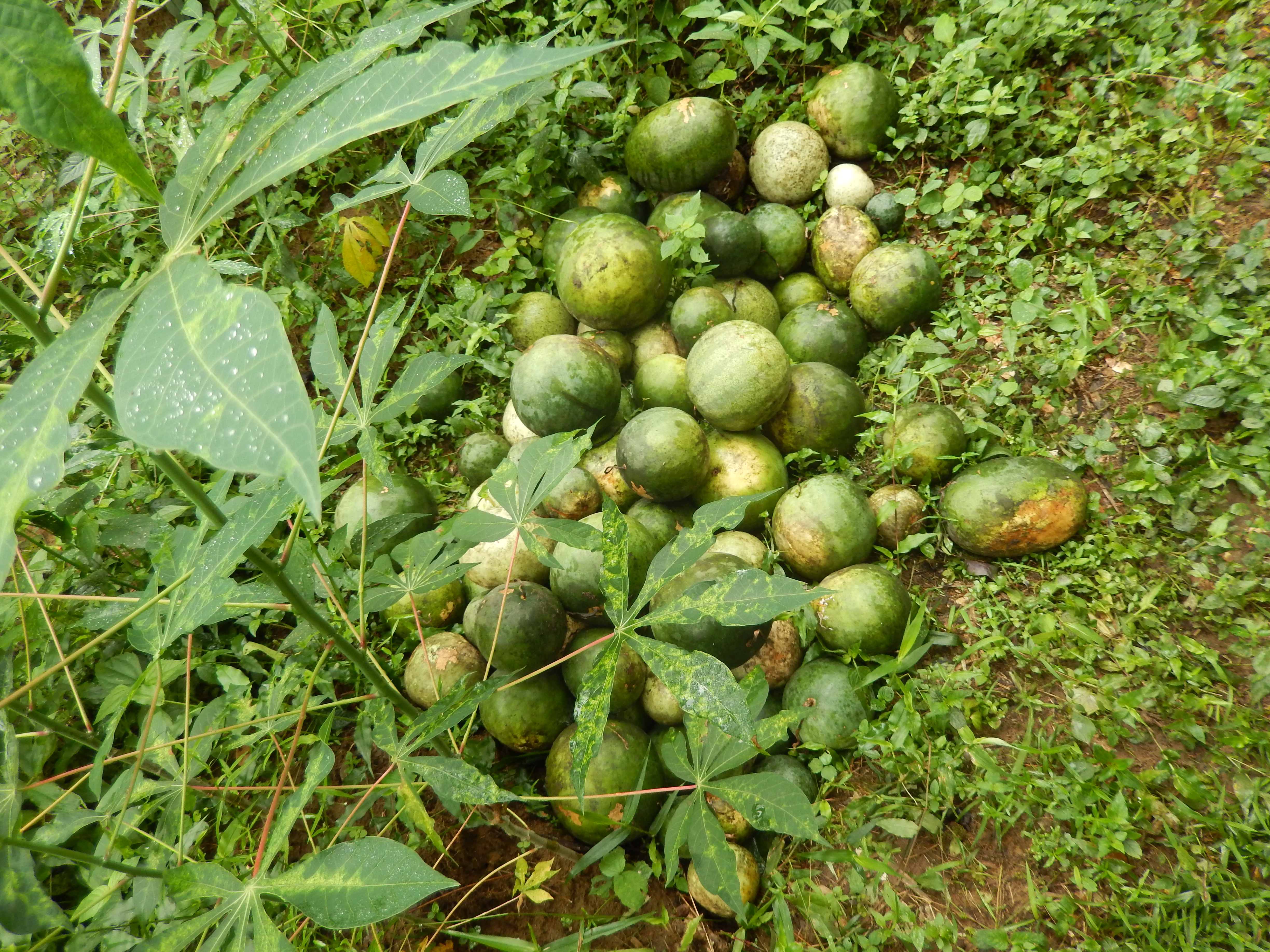 Fruit de Cucumeropsis mannii (Tayap, Cameroun)